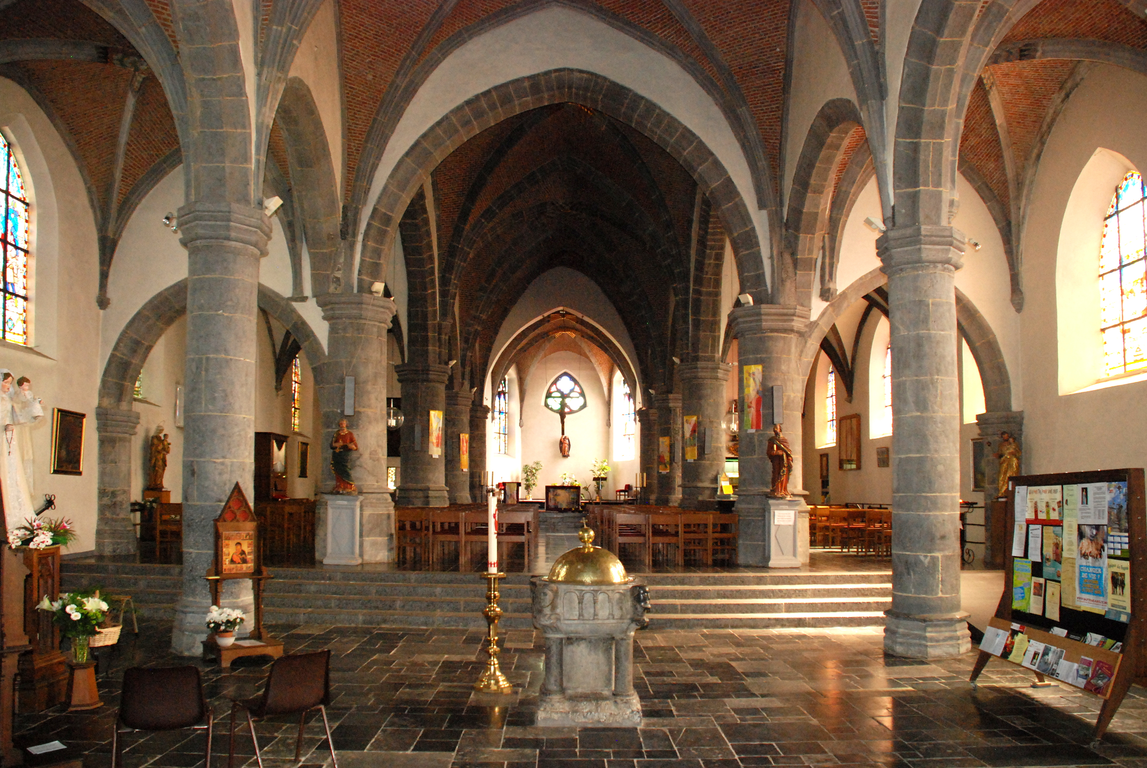 Belgique - Wallonie - Fonts baptismaux de Gerpinnes